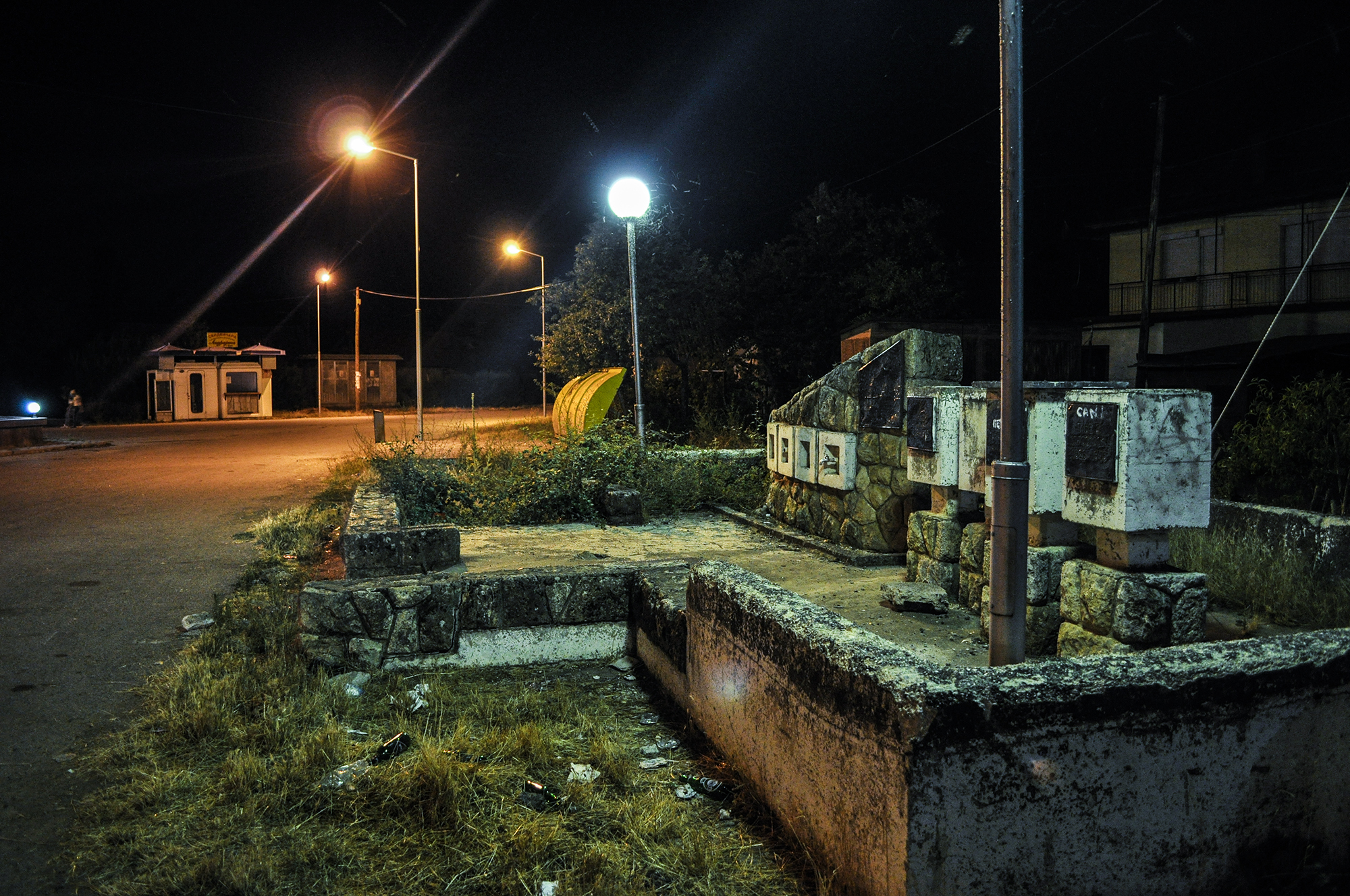 Волино средсело, споменици за НОБ